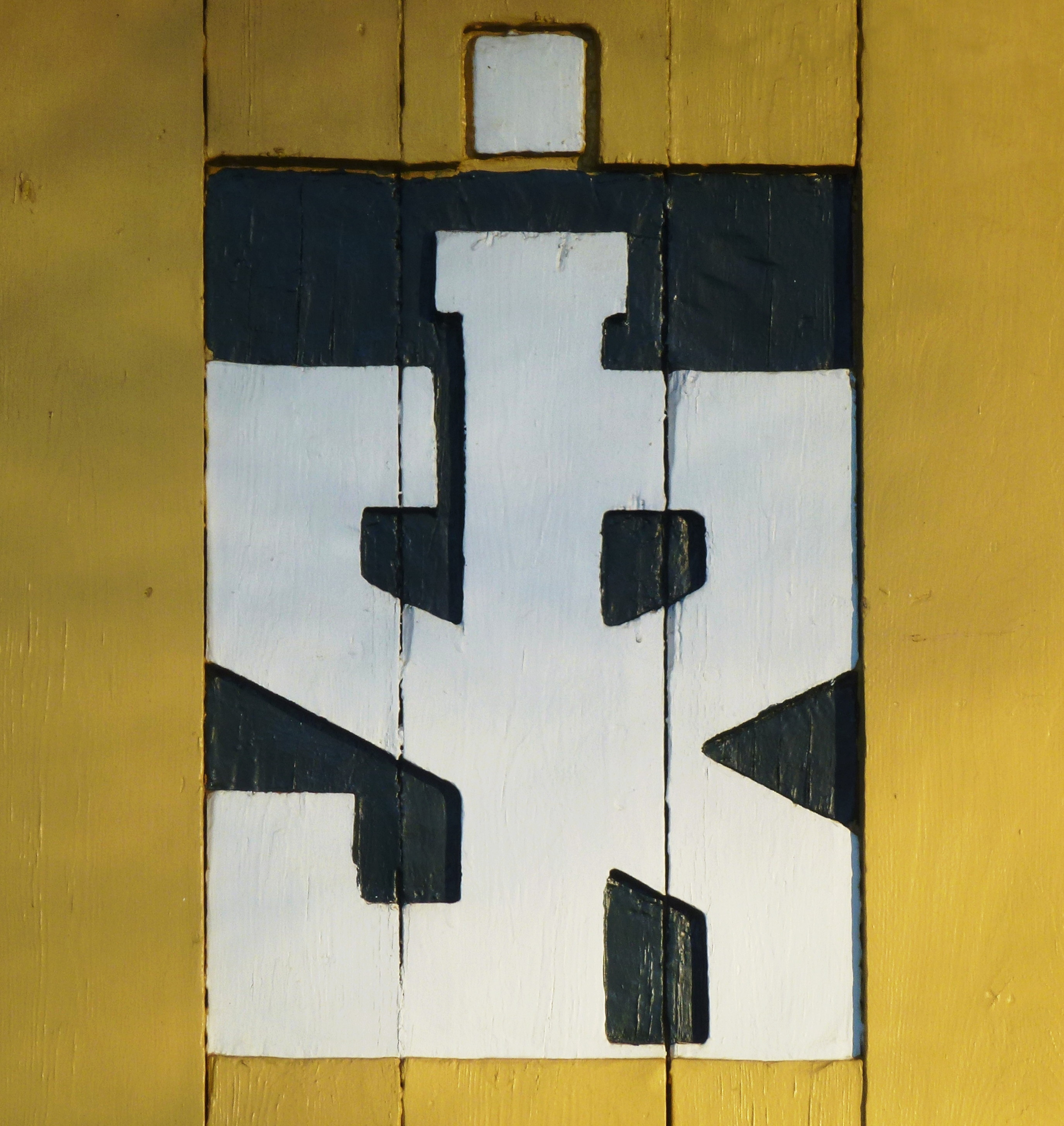 Stockholm Rimbo Järnväg, logo på väntkur Vendevägen